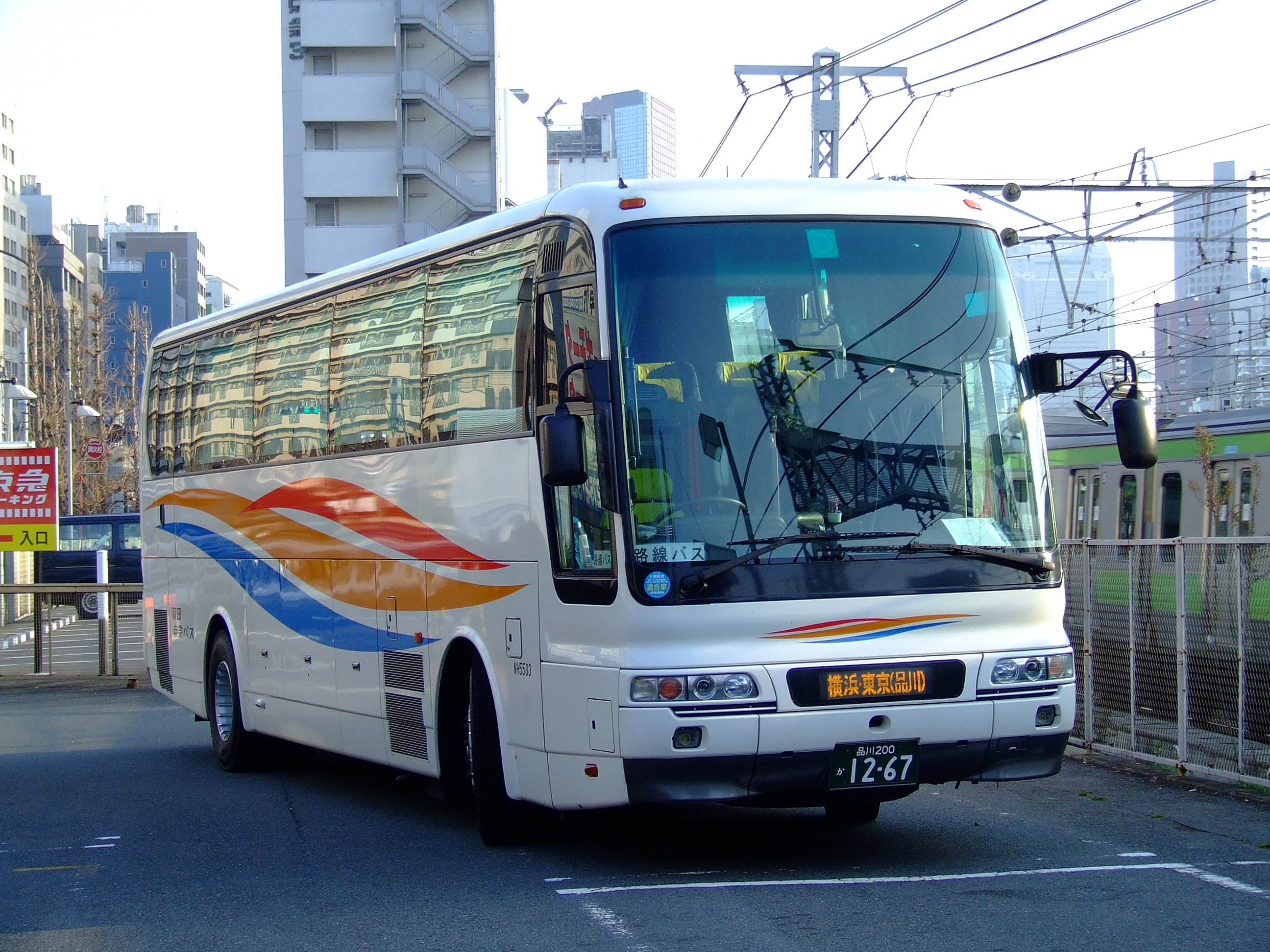 京急高速バスシャトー号（羽田京急バス）品川行き 品川バスターミナルにて